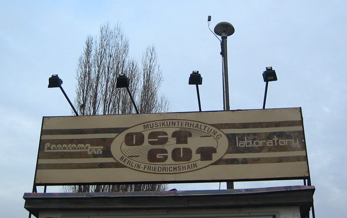 Ostgut in Berlin